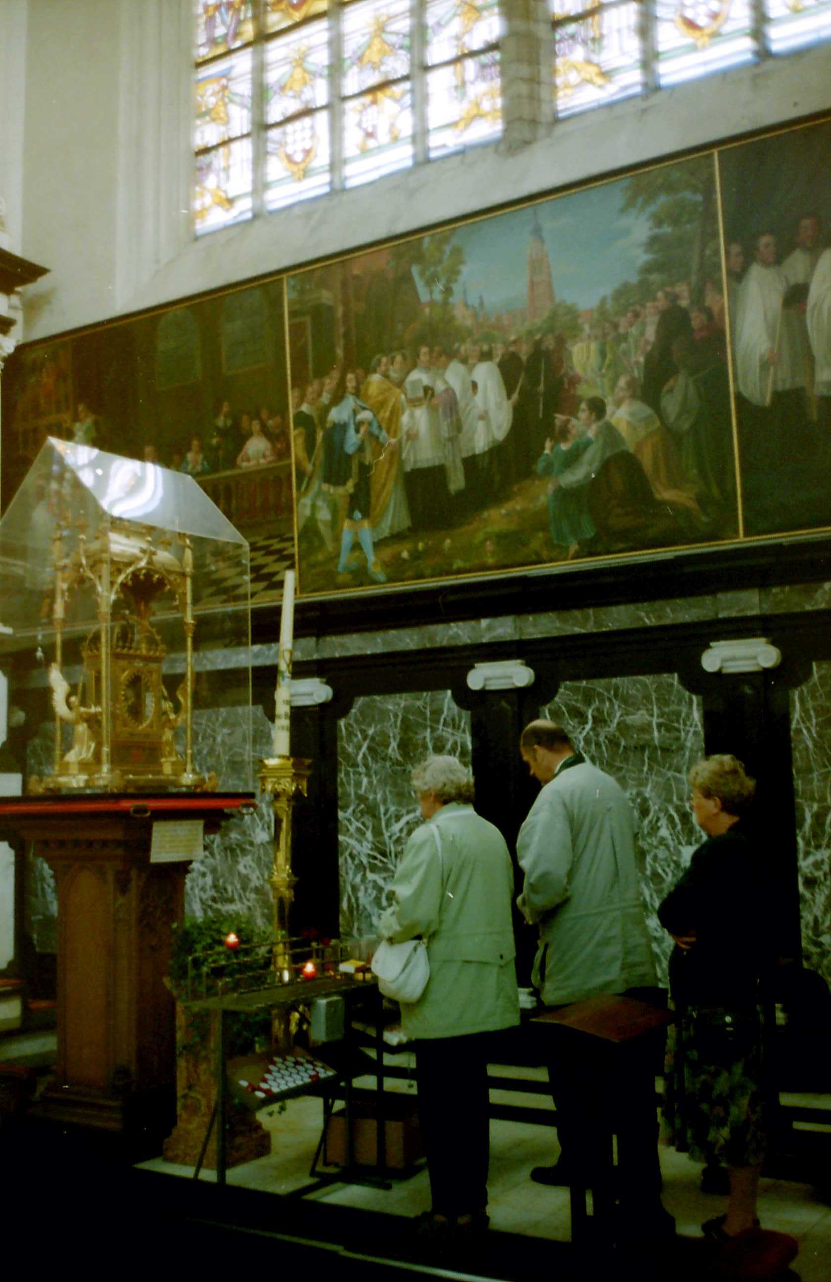 Interieur van de Sint-Catharinakerk te Hoogstraten, België